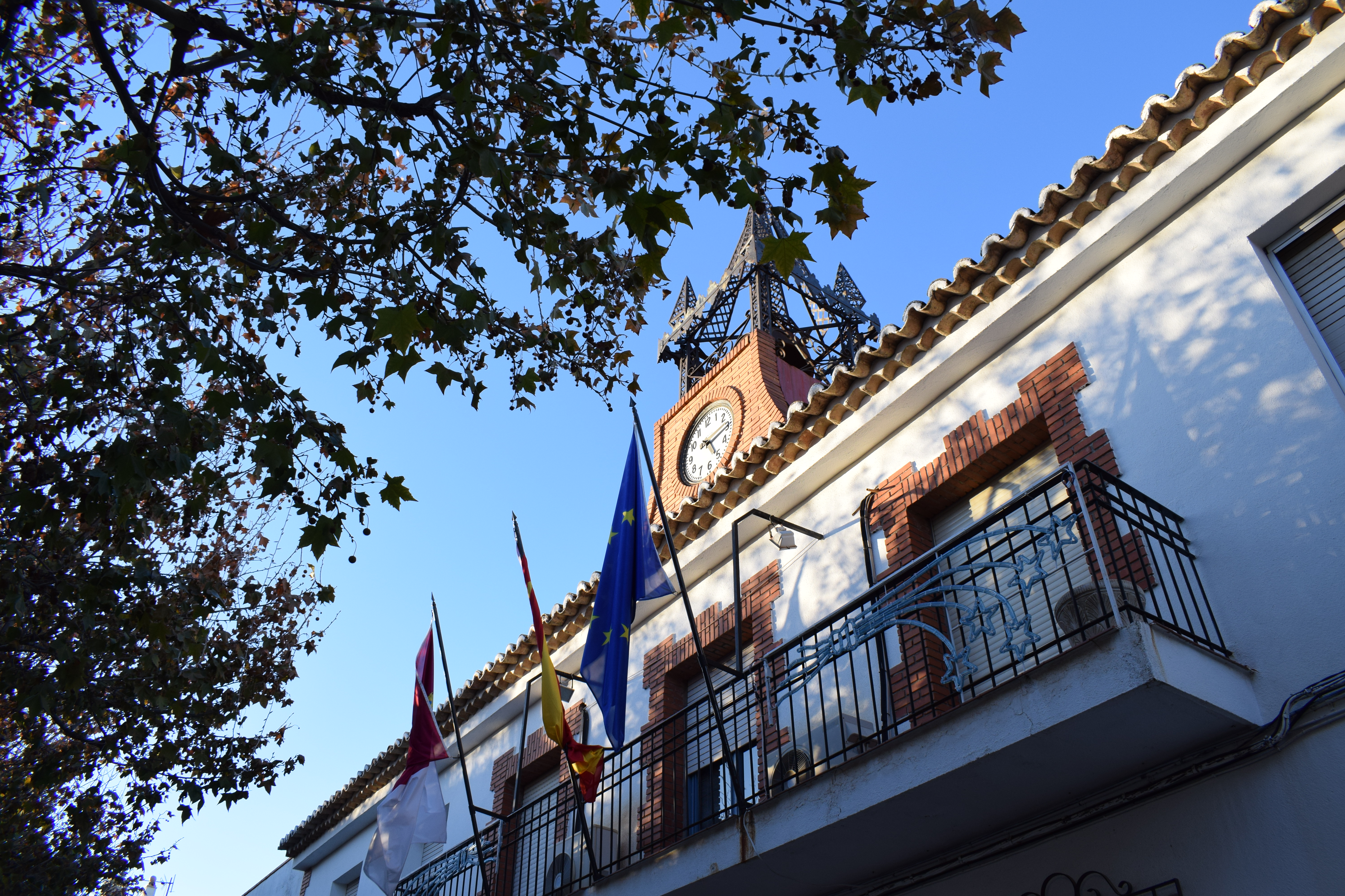 Vista Reloj del Ayuntamiento con torre metálica de 1884